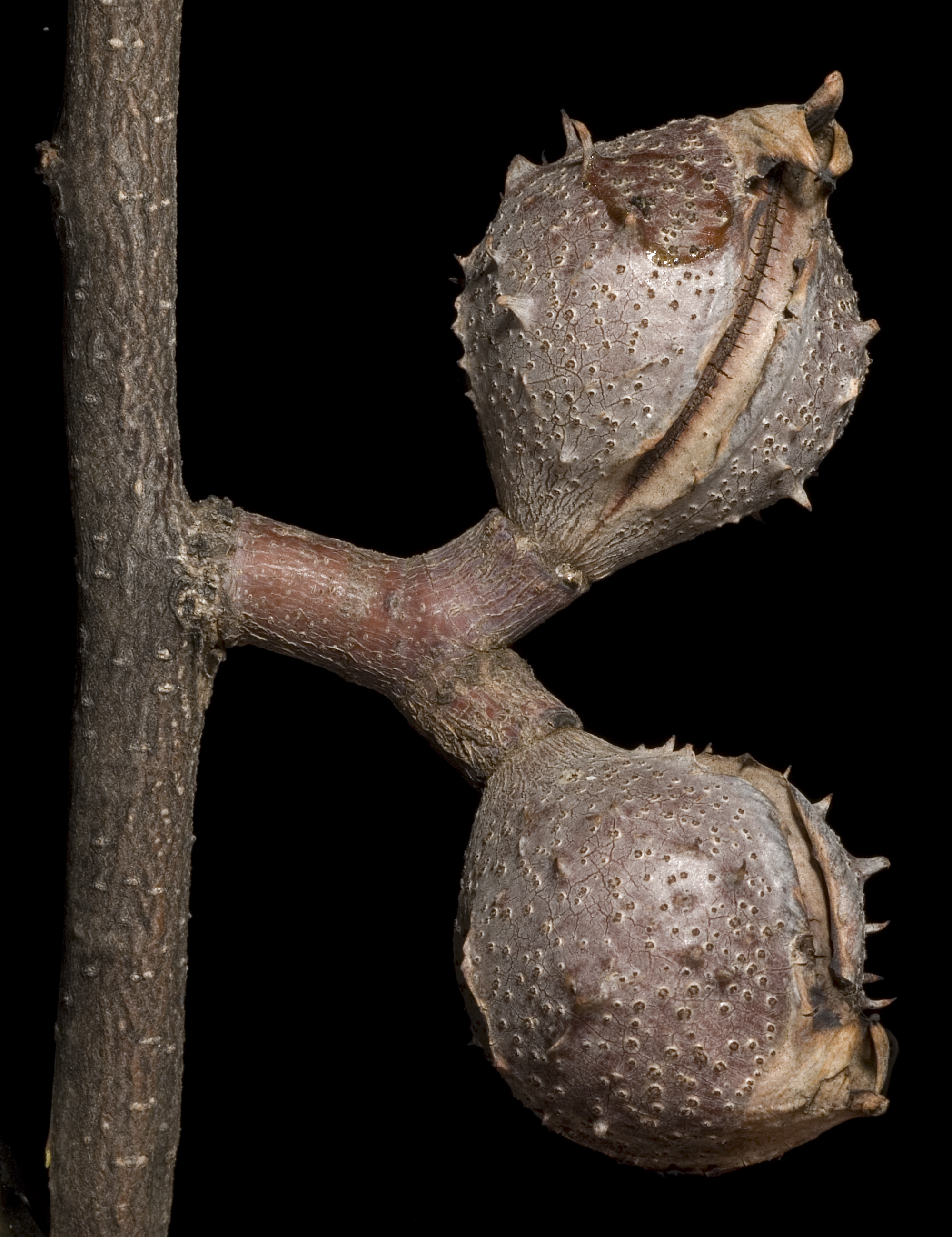 KRT3296